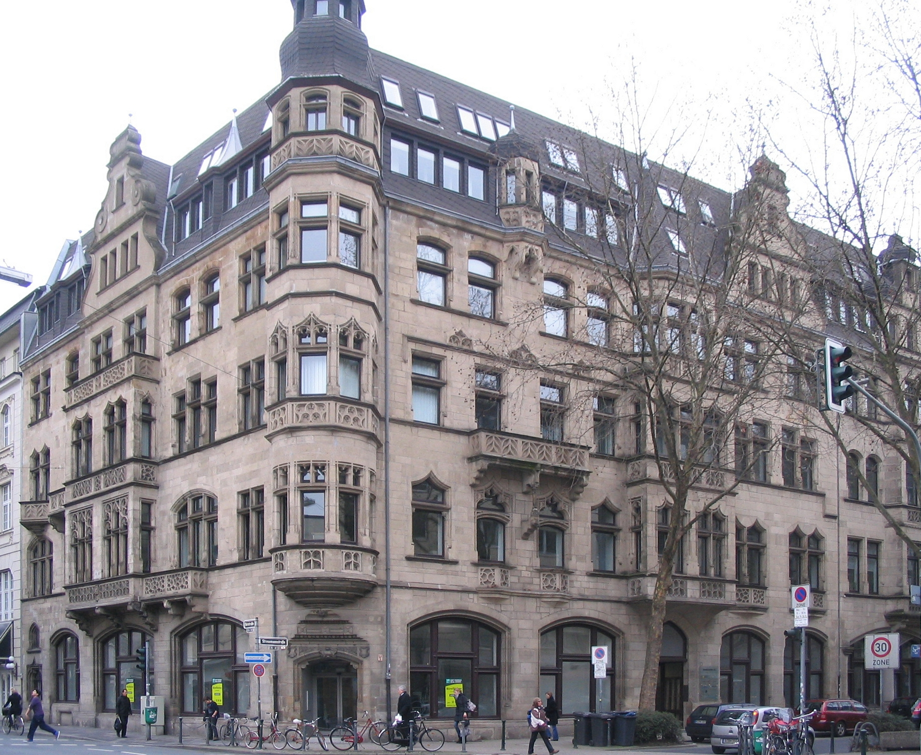 Düsseldorf, Stresemannstraße 26, Ecke Oststraße. Ehemals Hotel „Römischer Kaiser“ (denkmalgeschützter Bau). Von der Oststraße Blickrichtung Norden.